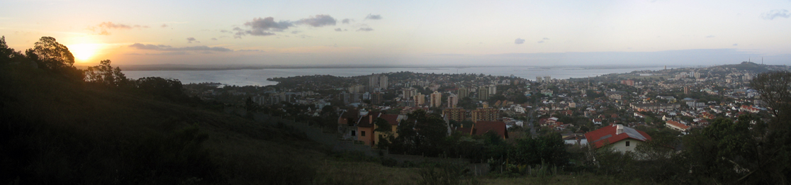 Vista panorâmica de Porto Alegre a partir do Morro do Osso.